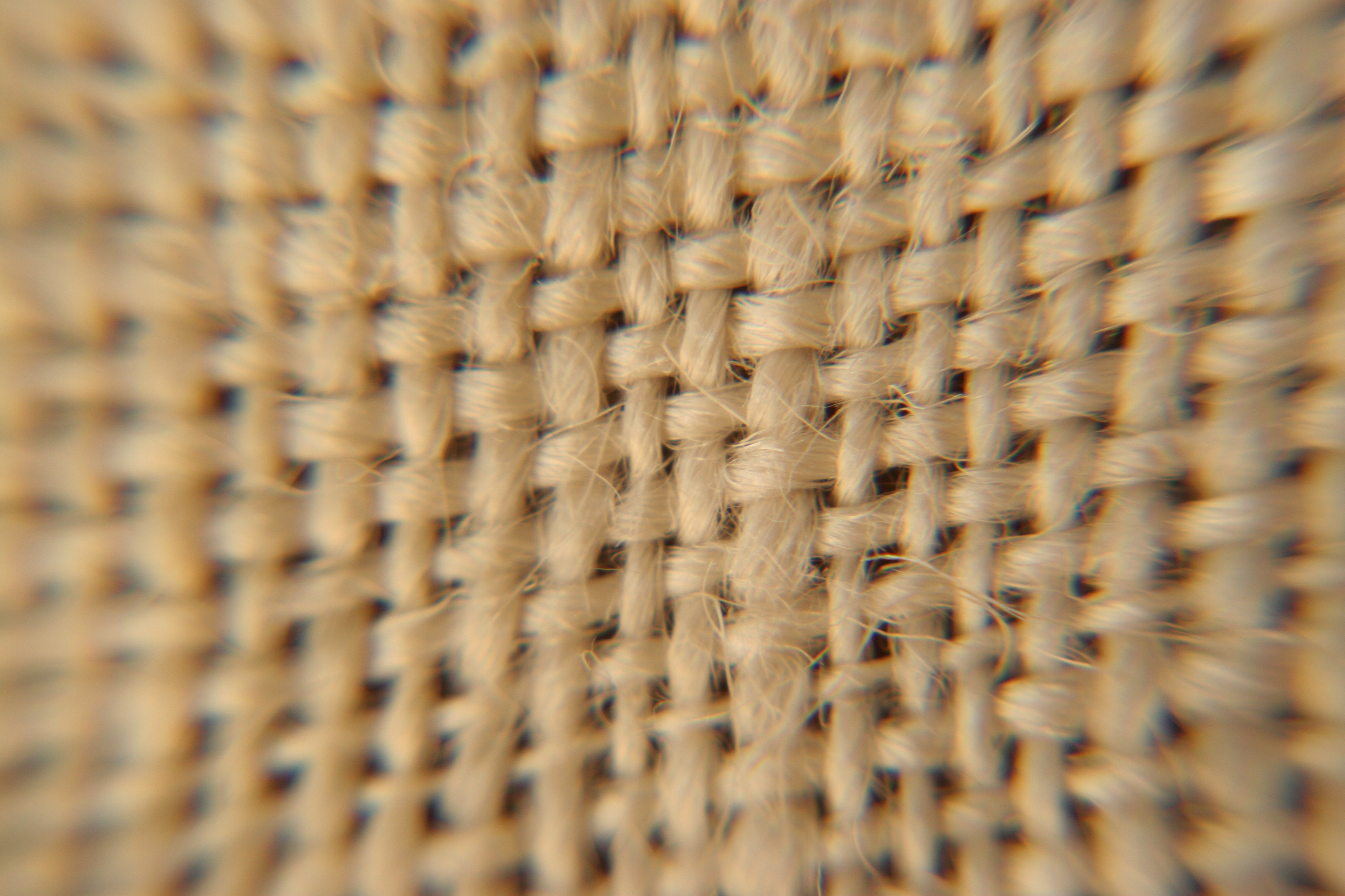 Leinengewebe